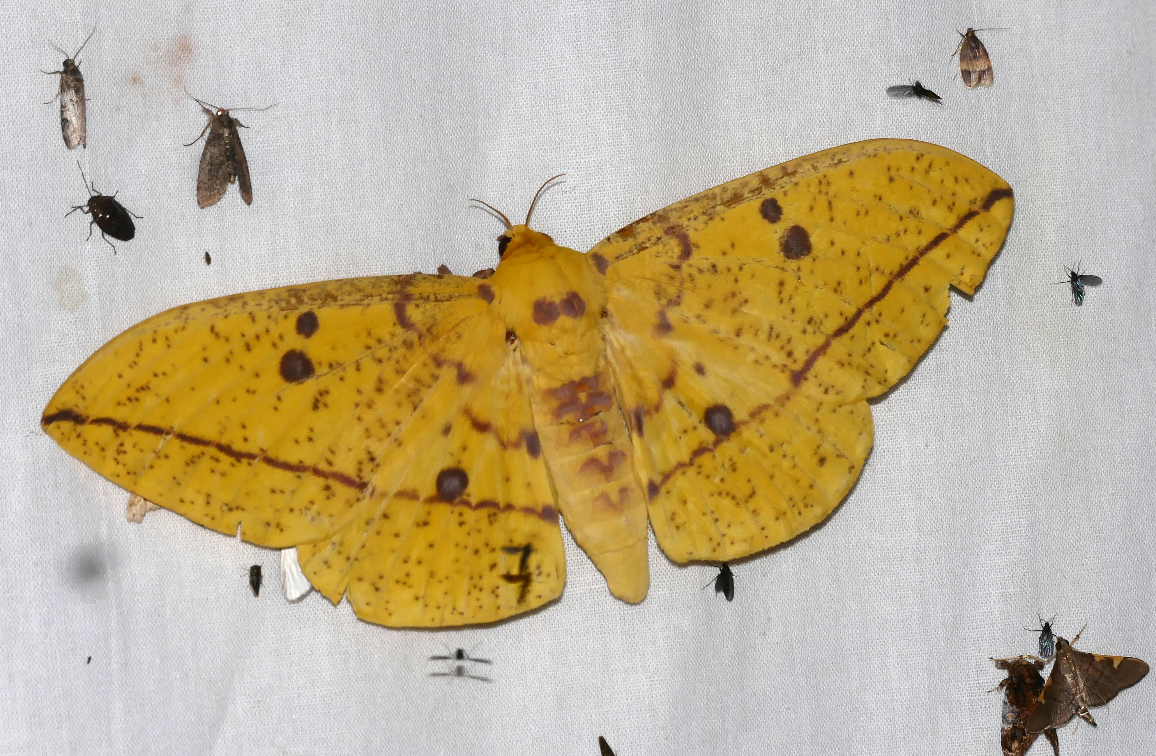 Piste de Bélizon, Roura, French Guyana, FRANCE